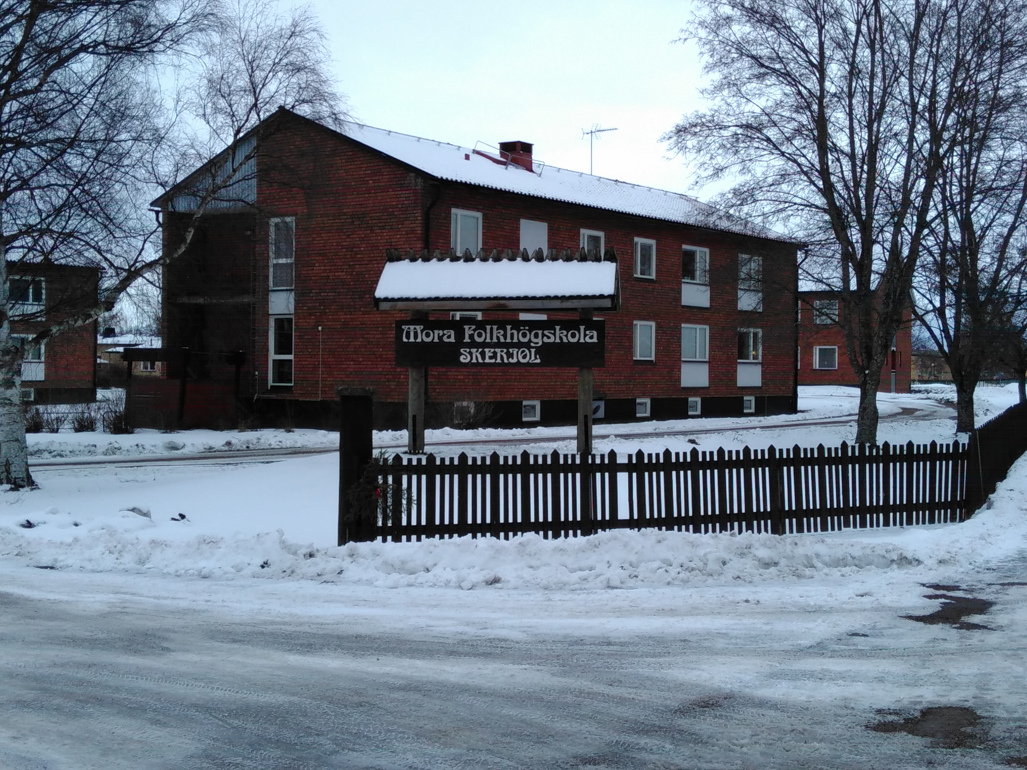 Infarten till Mora folkhögskola